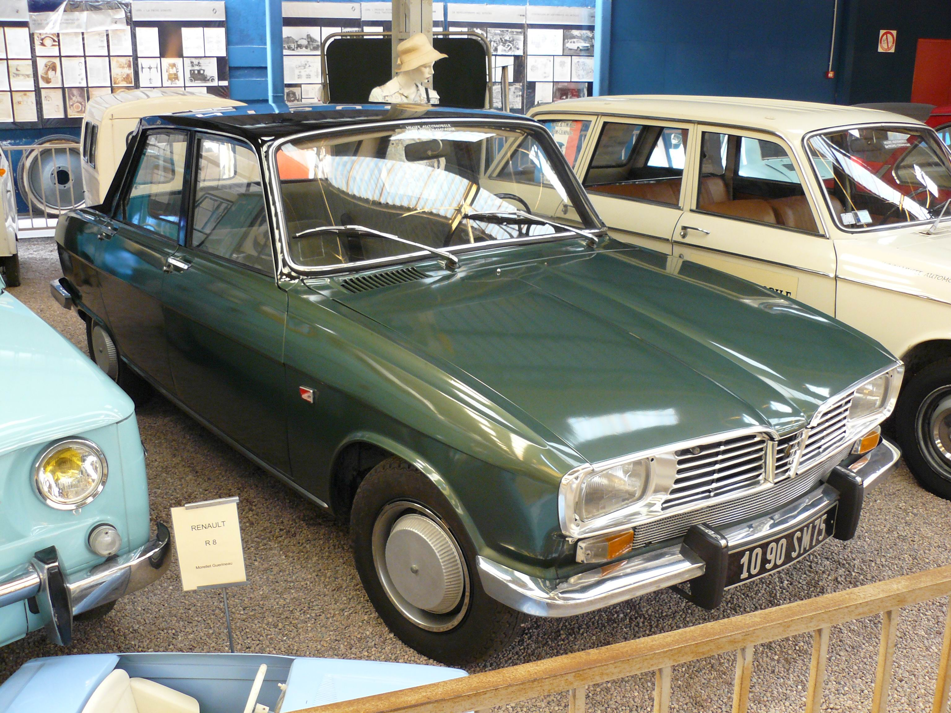 Musée de Reims Octobre 2010.